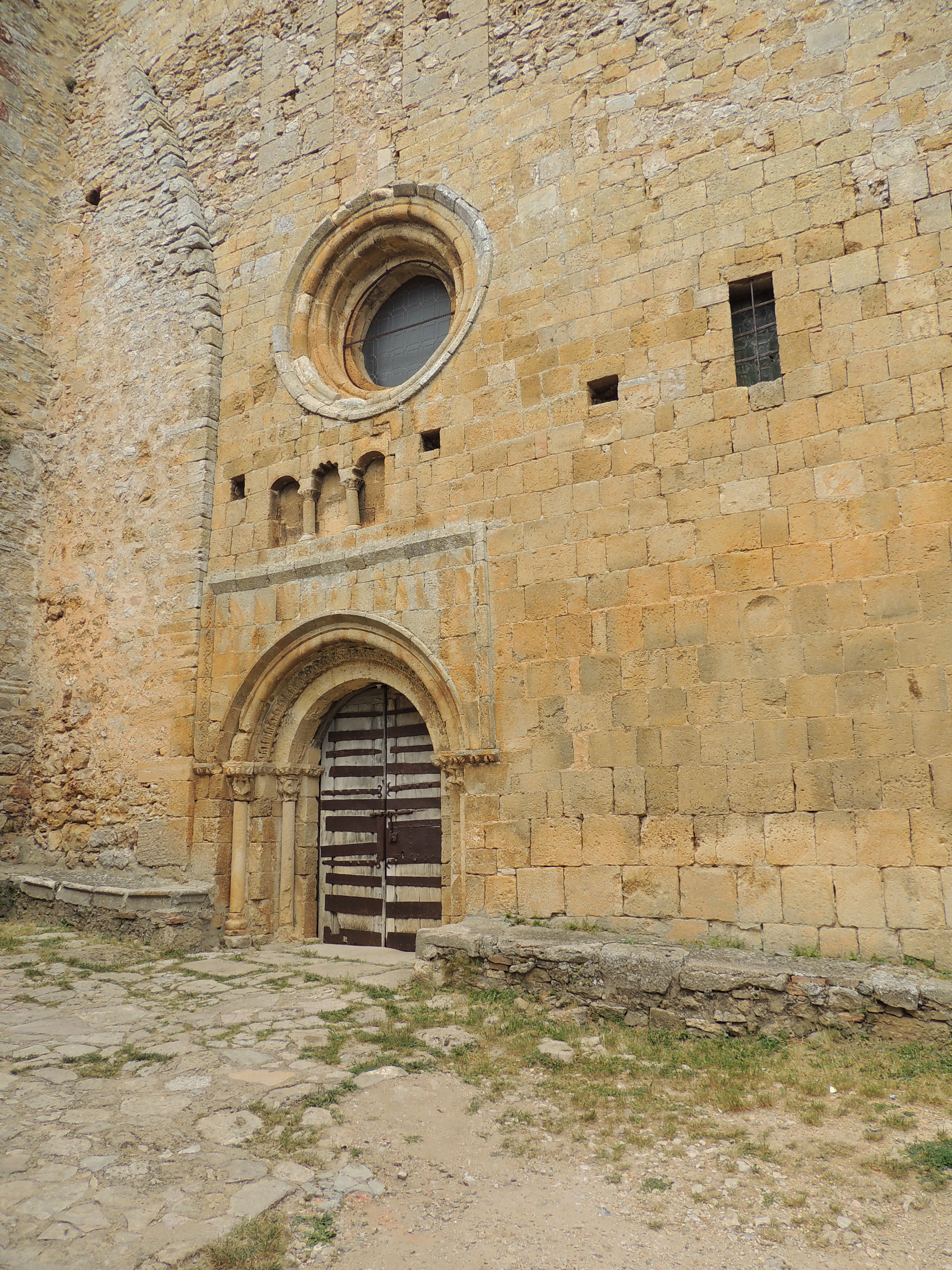 Iglesia de Nuestra Señora del Castillo de Calatañazor